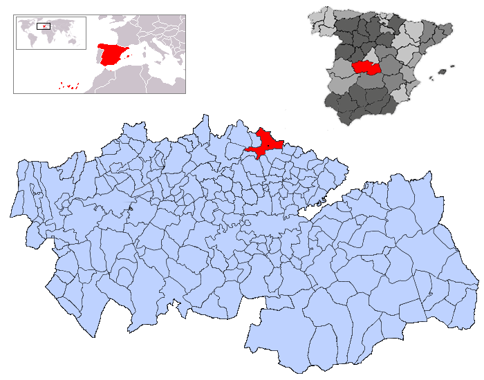 Casarrubios del Monte en la provincia de Toledo